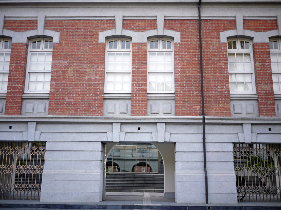 行政院文化建設委員會文化資產總管理處籌備處南部辦公室，位於原臺南州廳側廊。